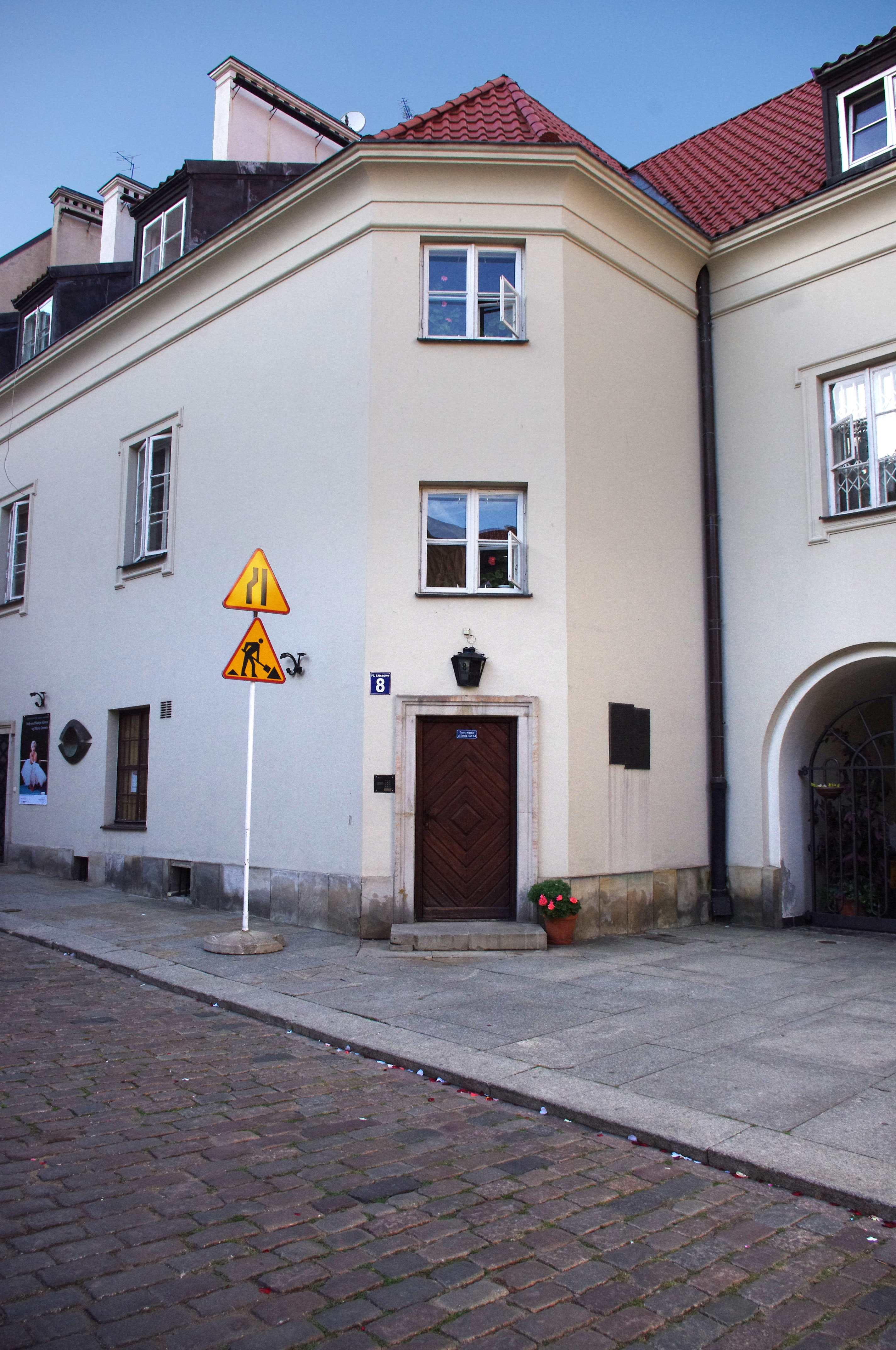 Kamienica przy pl. Zamkowym 8 w Warszawie gdzie w latach 1969-1989 mieszkał politolog Edmund Osmańczyk